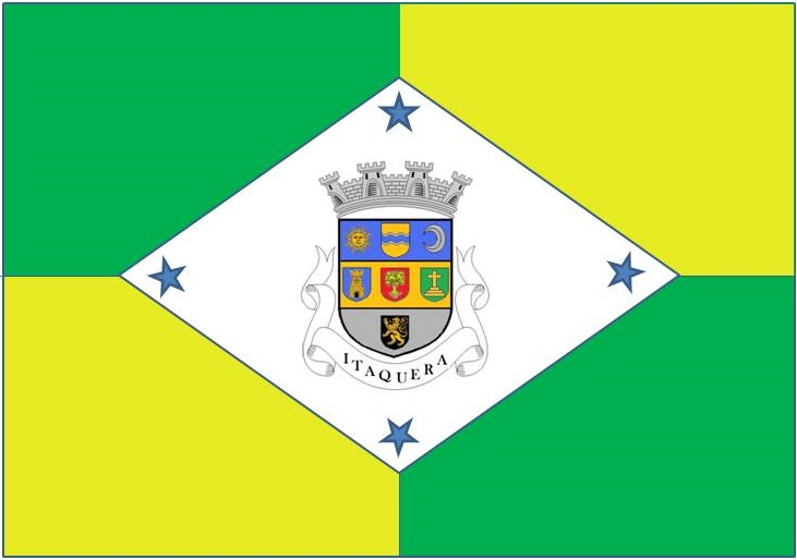 Bandeira do Distrito de Itaquera, São Paulo, Brasil